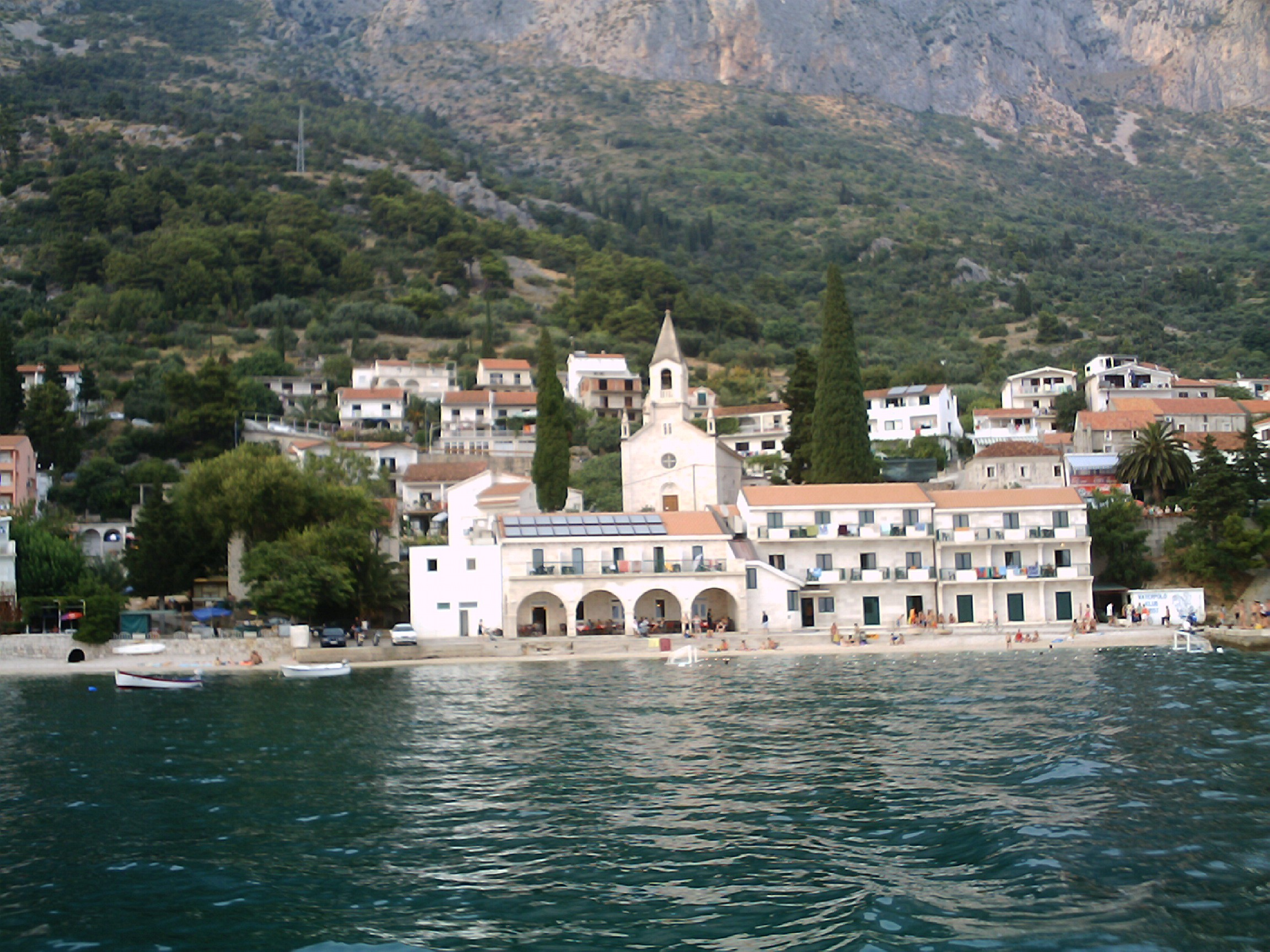 Blick auf Brist vom Wasser aus